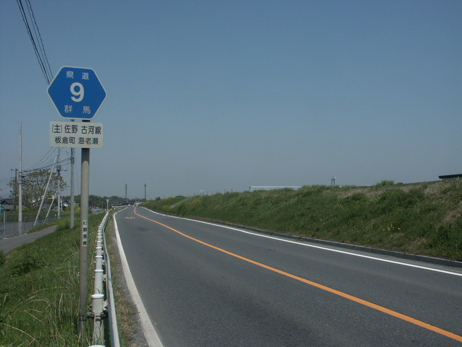 群馬県道9号線板倉町海老瀬付近（佐野市方面を撮影）